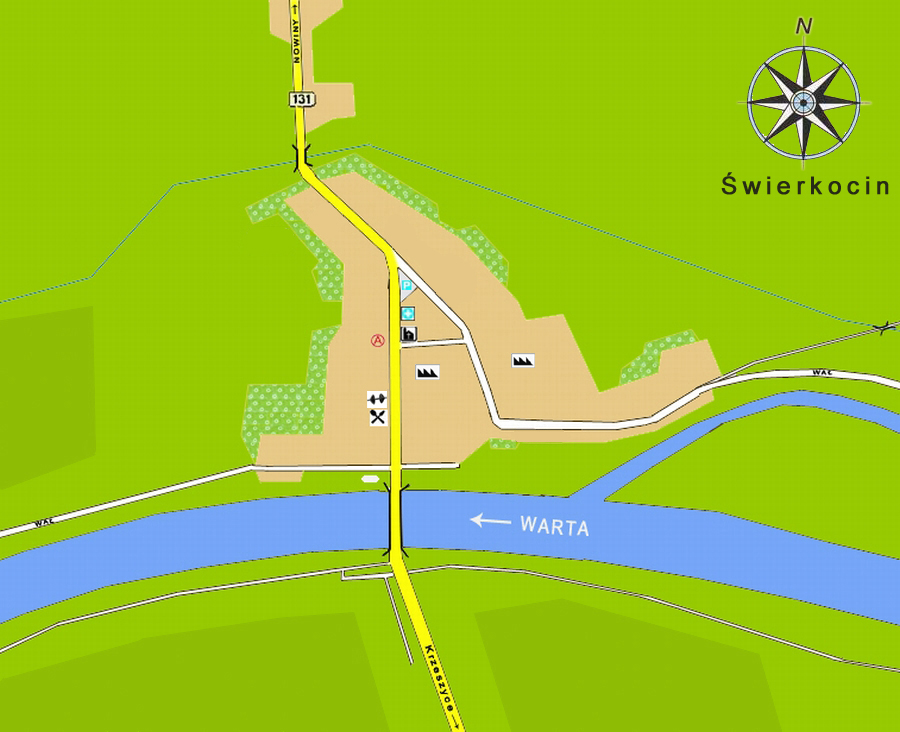 Mapa Świerkocina